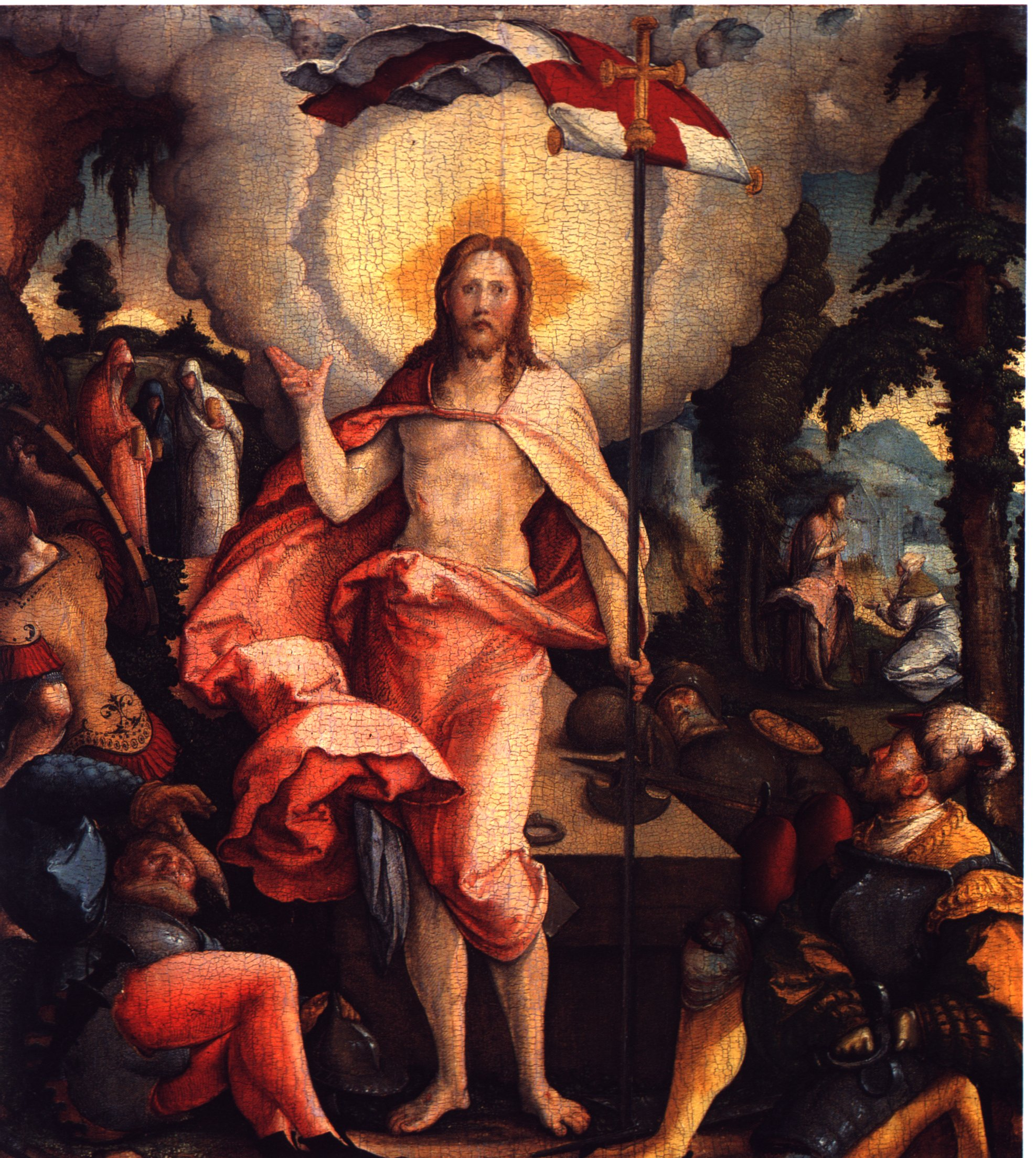 Nebenaltäre, Mittelstücke, ehemals in der St. Martinskirche in Meßkirch Auferstehung Christi, im Hintergrund links: Drei Marien, rechts: Christus als Gärtner (noli me tangere) Eingescannt aus: Anna Moraht-Fromm und Hans Westhoff: Der Meister von Meßkirch – Forschungen zur südwestdeutschen Malerei des 16. Jahrhunderts, Ulm, 1997, S. 155